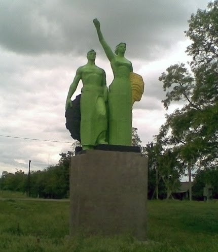 В'їзд в с. Погребняки, Полтавська область.